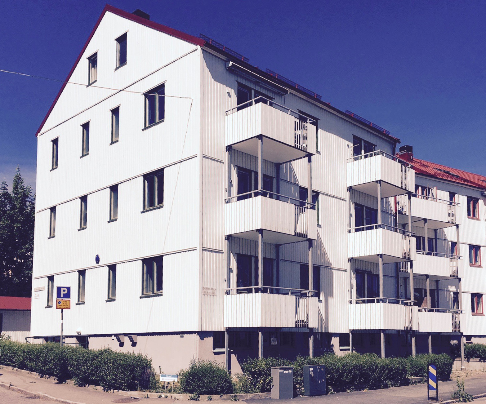 Sofiagatan 48A i Göteborg. Flerfamiljshus i kvarteret Helagsfjället ritat 1929-30 för HSB av arkitekterna Ingrid Wallberg och Alfred Roth.